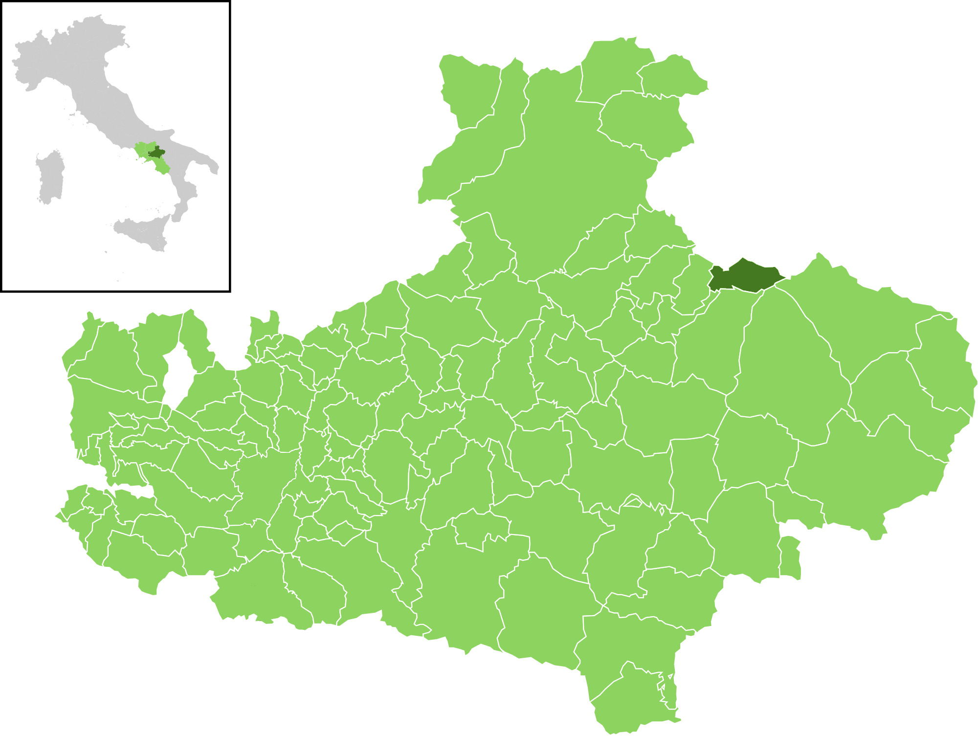 Posizione del comune all'interno della provincia di Avellino